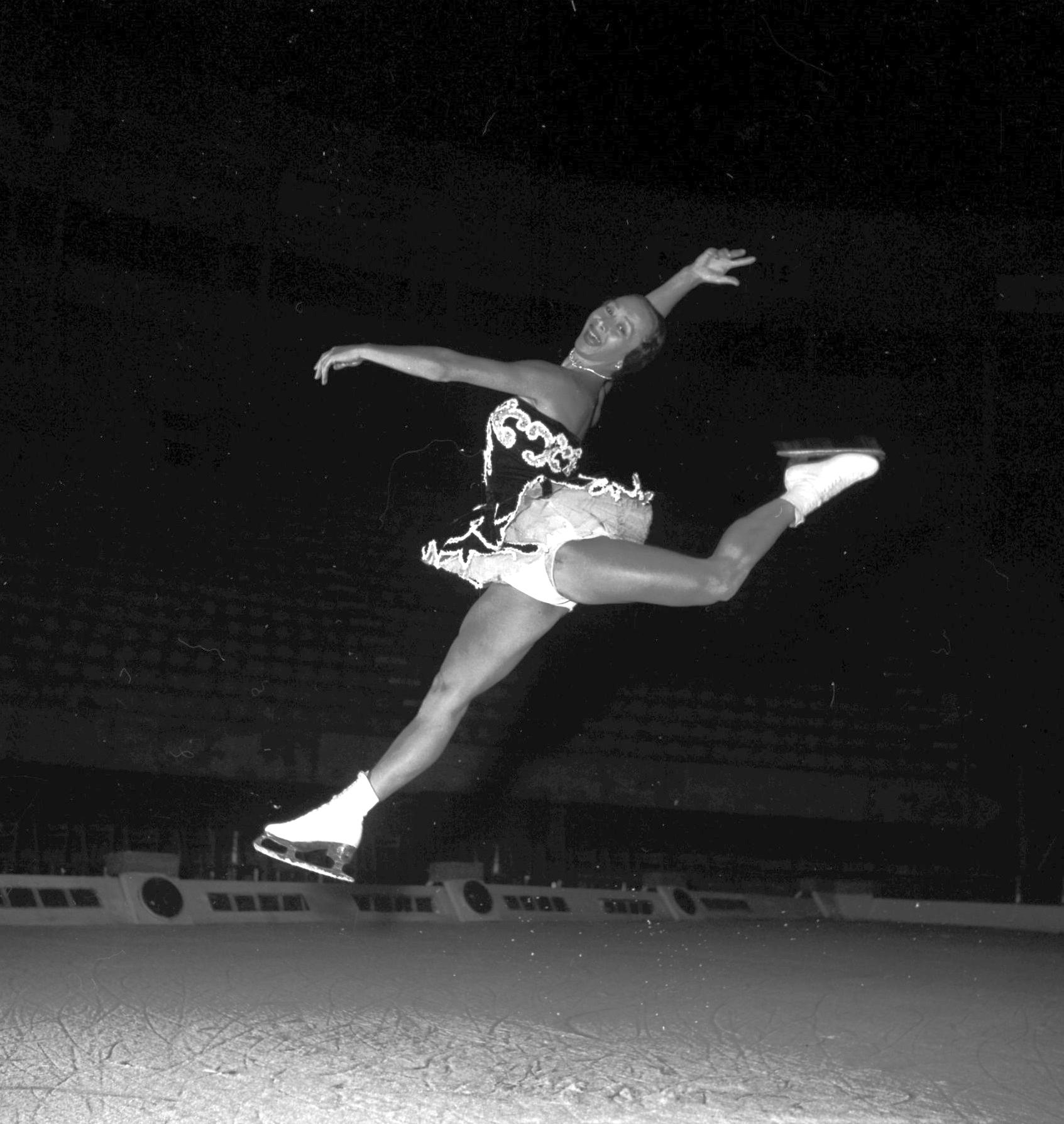 Patinoire de Toulouse. Septembre 1953. Vue de Jacqueline du Bief sur une patinoire toulousaine.